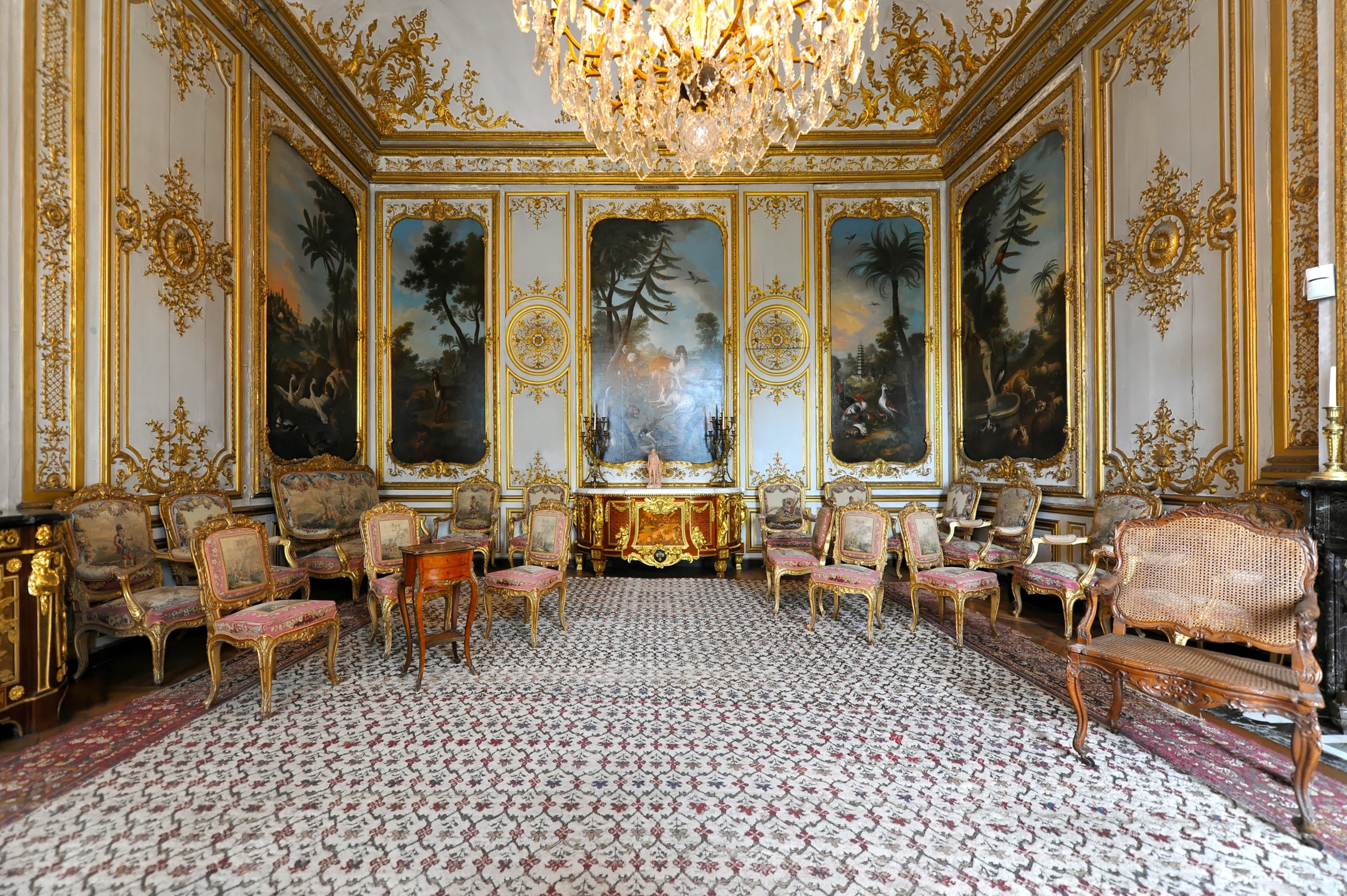 Les Appartements des princes de Condé La chambre de Monsieur le Prince